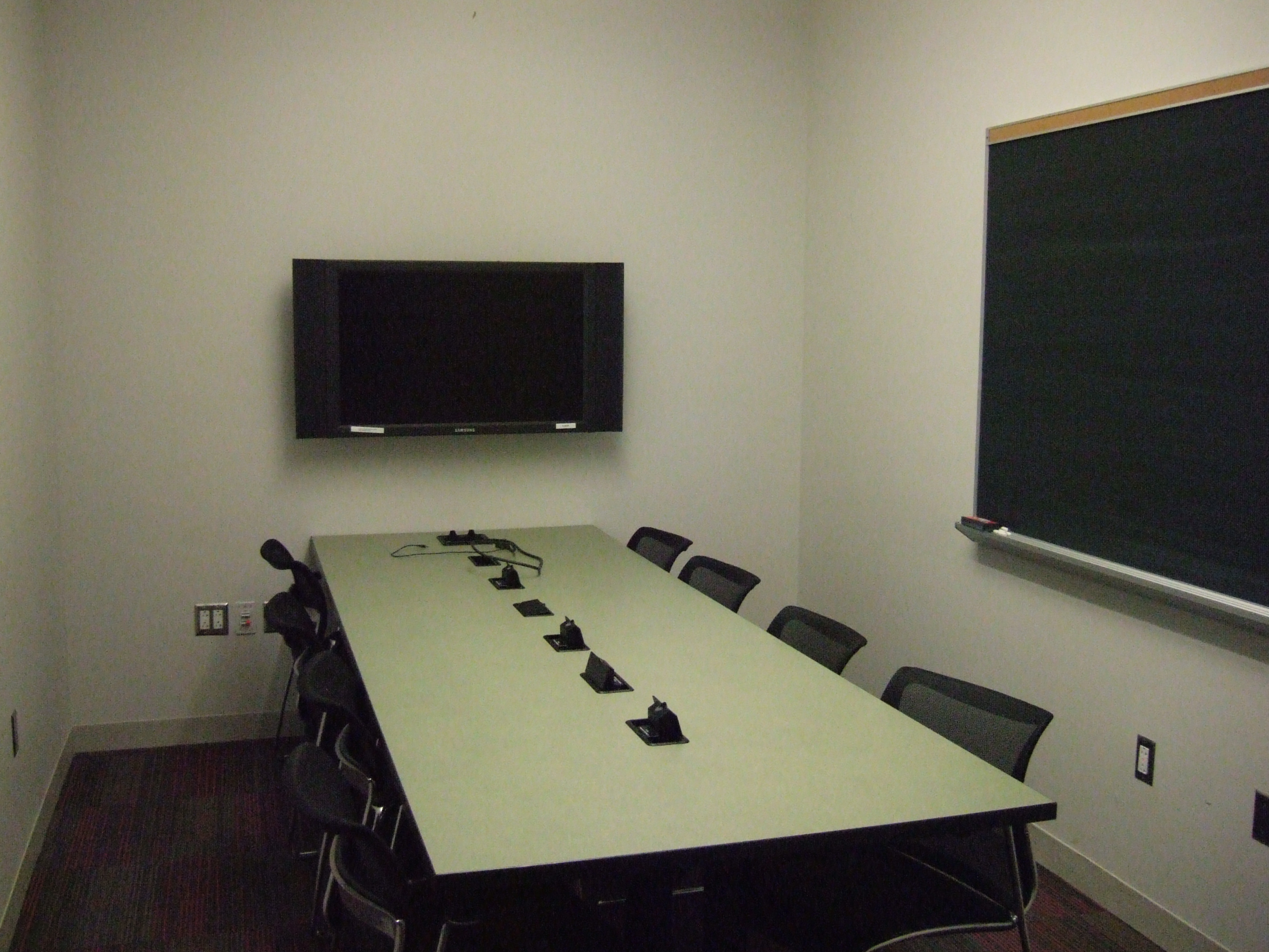 03/07/06 taken by Kisstory